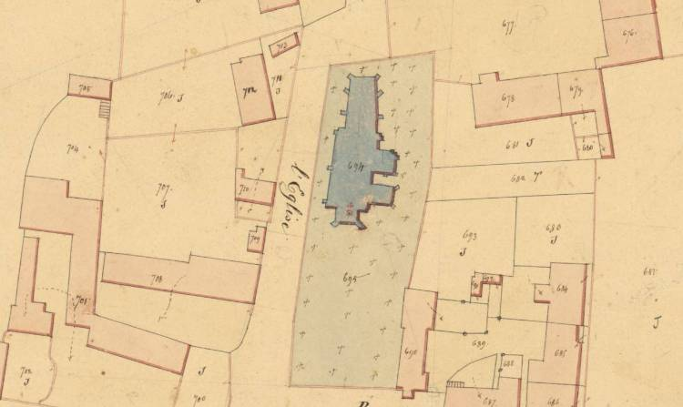 Plan de la première église de Genlis